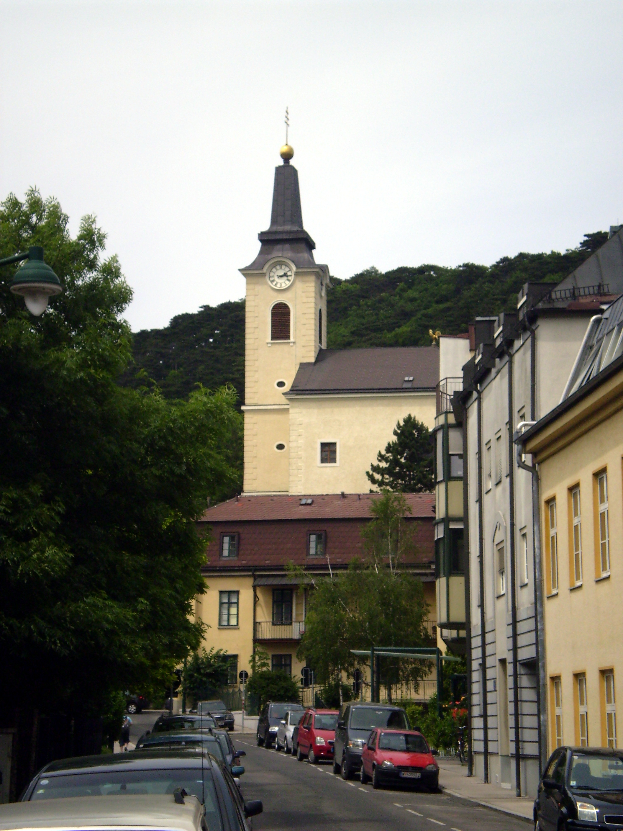 Blick durch die Mackgasse auf die Kalksburger Pfarrkirche.